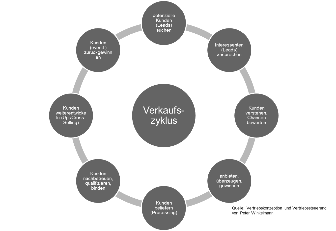 Die acht Grundaktivitäten des Verkaufszykluses